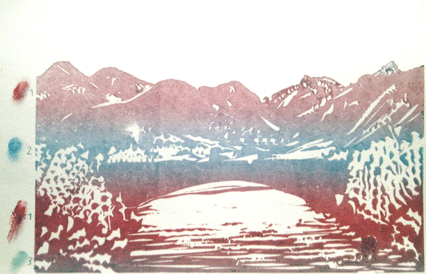 Linocut - plate number 2